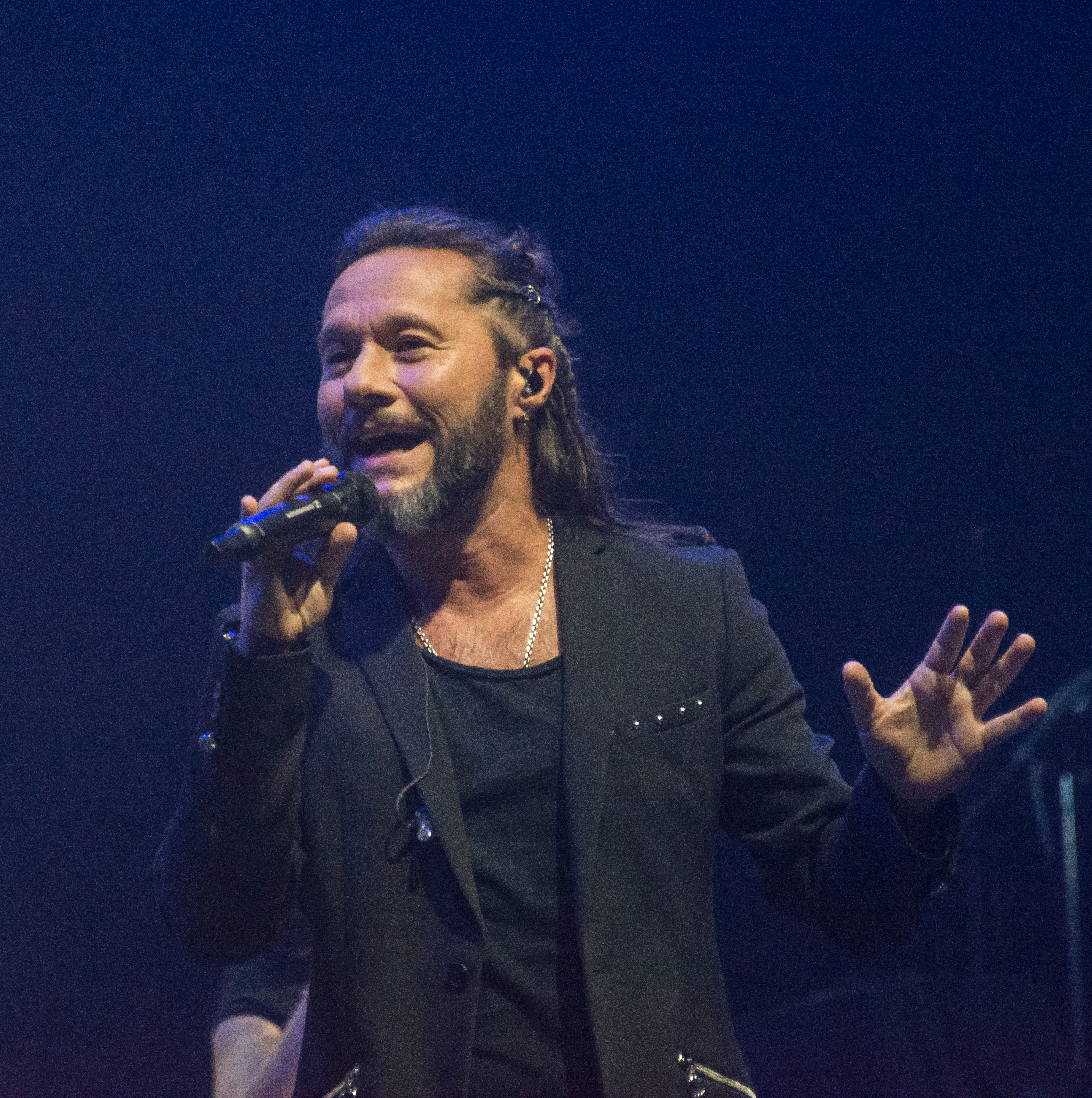 Diego Torres, Copihue de Oro 2018, Sun Monticello, Mostazal, Región de O'Higgins, Chile